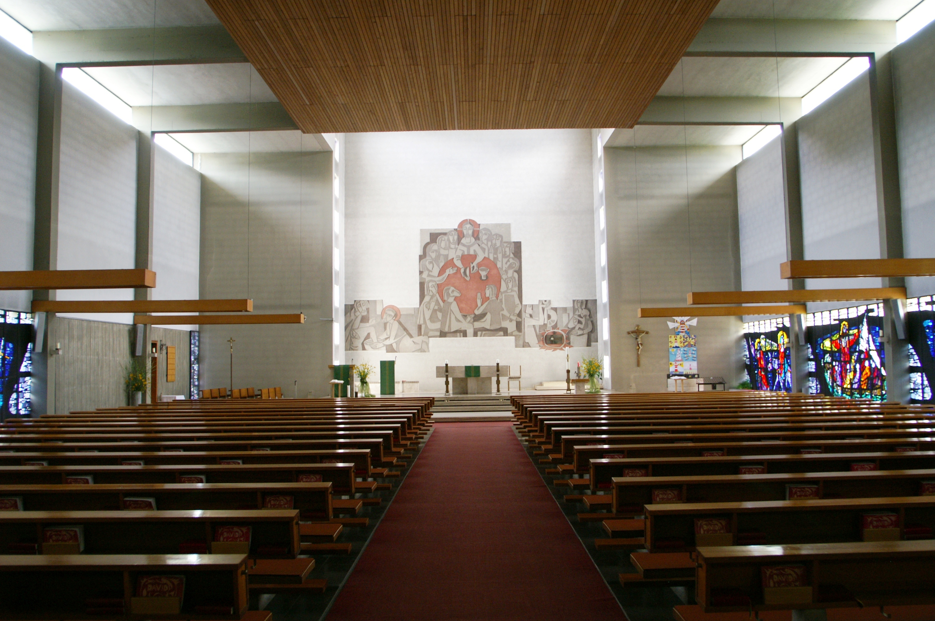 Pfarrkirche St. Christoph im Rohrbach in Dornbirn erbaut nach Pänen von Norbert Kopf und Norbert Klotz in den Jahren 1963/64. An der Altarwand Sgraffito Fusswaschung, Abendmahl, bez. Hofer 73.